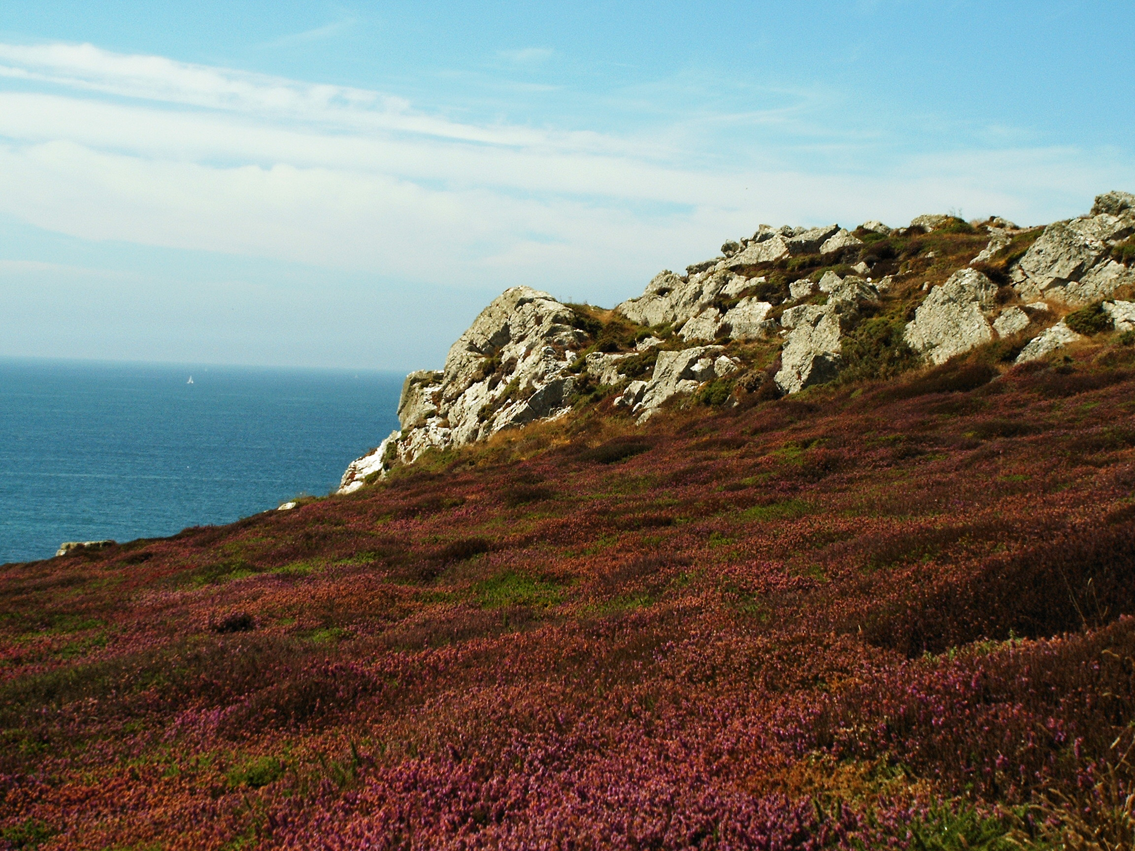 Heidelandschaft mit Felsen am Cap de La Chevre